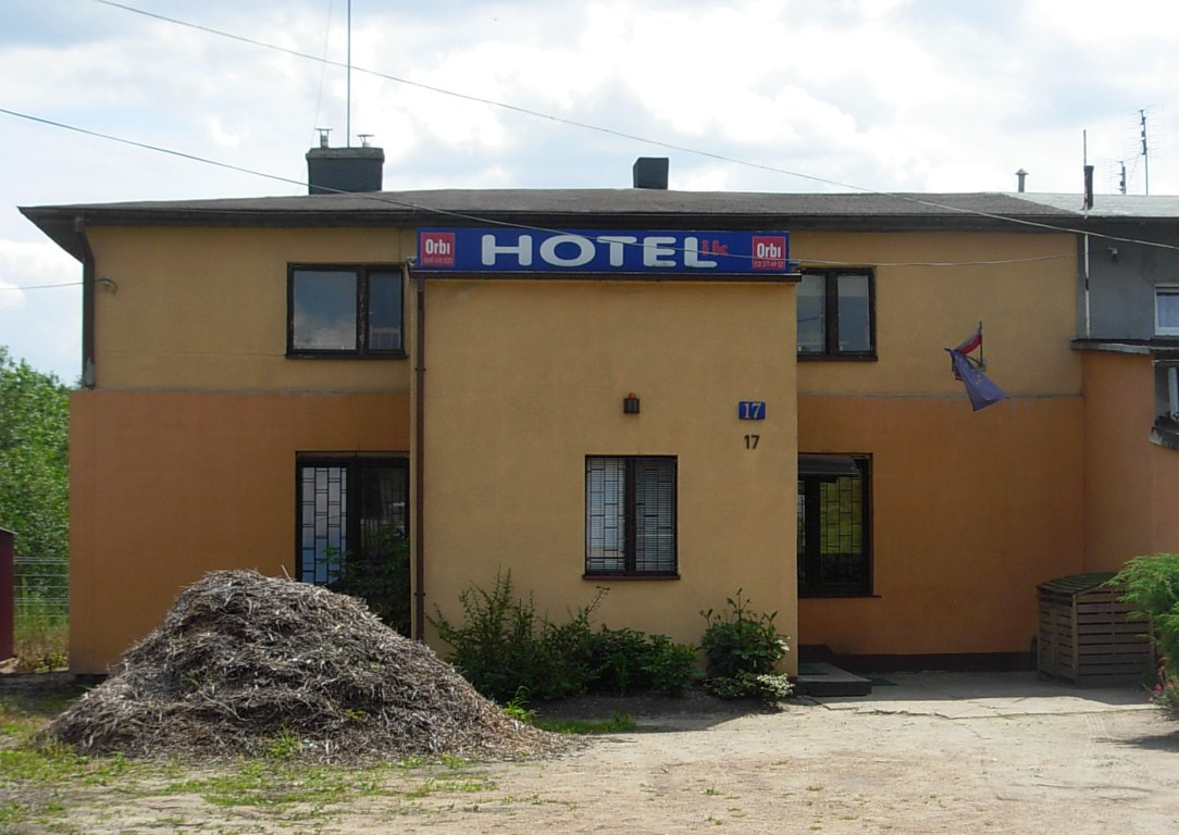 Hotel Orbi w Bydgoszczy, ul. Wczasowa 17